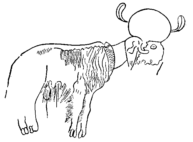 Representación un carnero grabado en las rocas de Bu Aleim (Sáhara). Se aprecia en él un tocado solar de influencia egipcia, con alusiones a Ammon